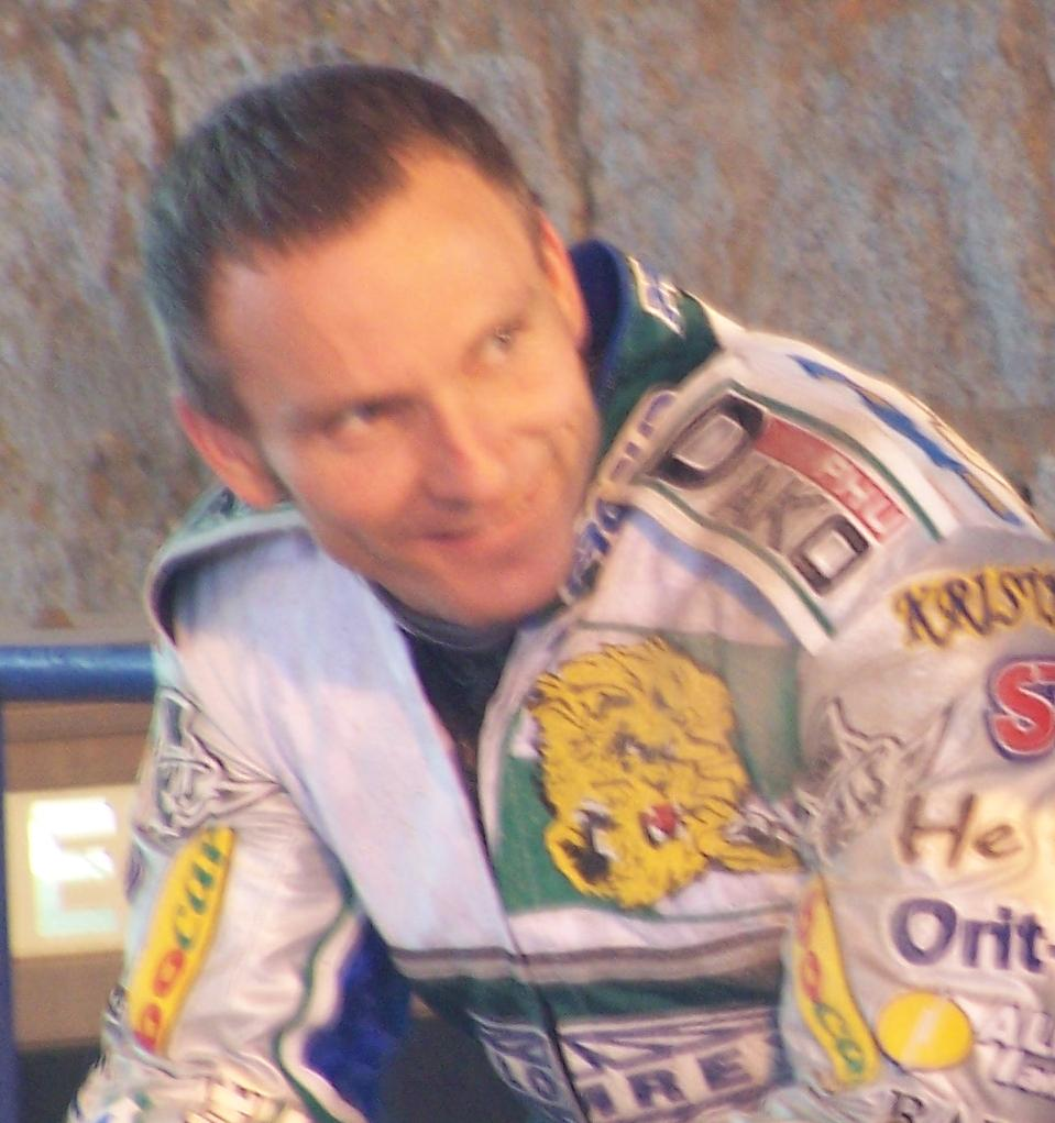 Sławomir Drabik, żużlowiec (speedway rider)